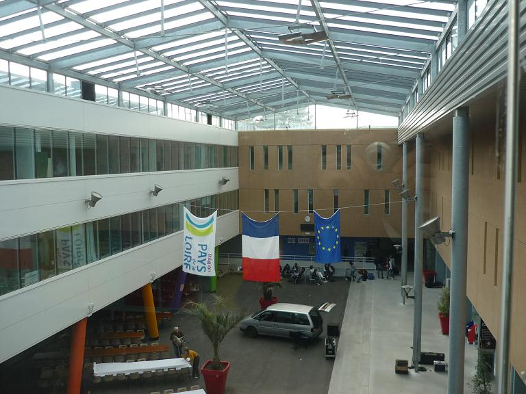 Patio du Lycée Chevrollier, Angers